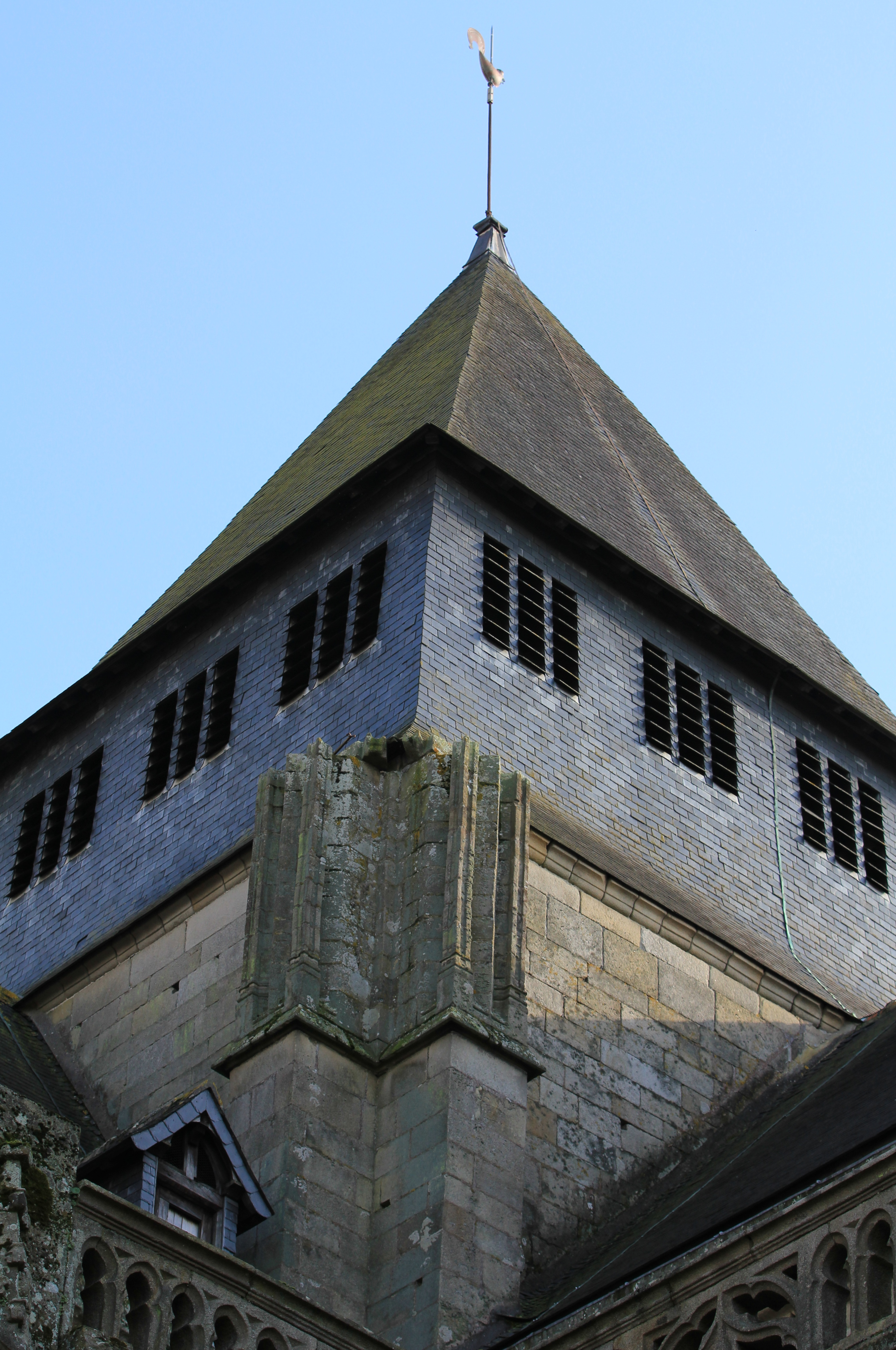 Église Saint-Malo de Dinan